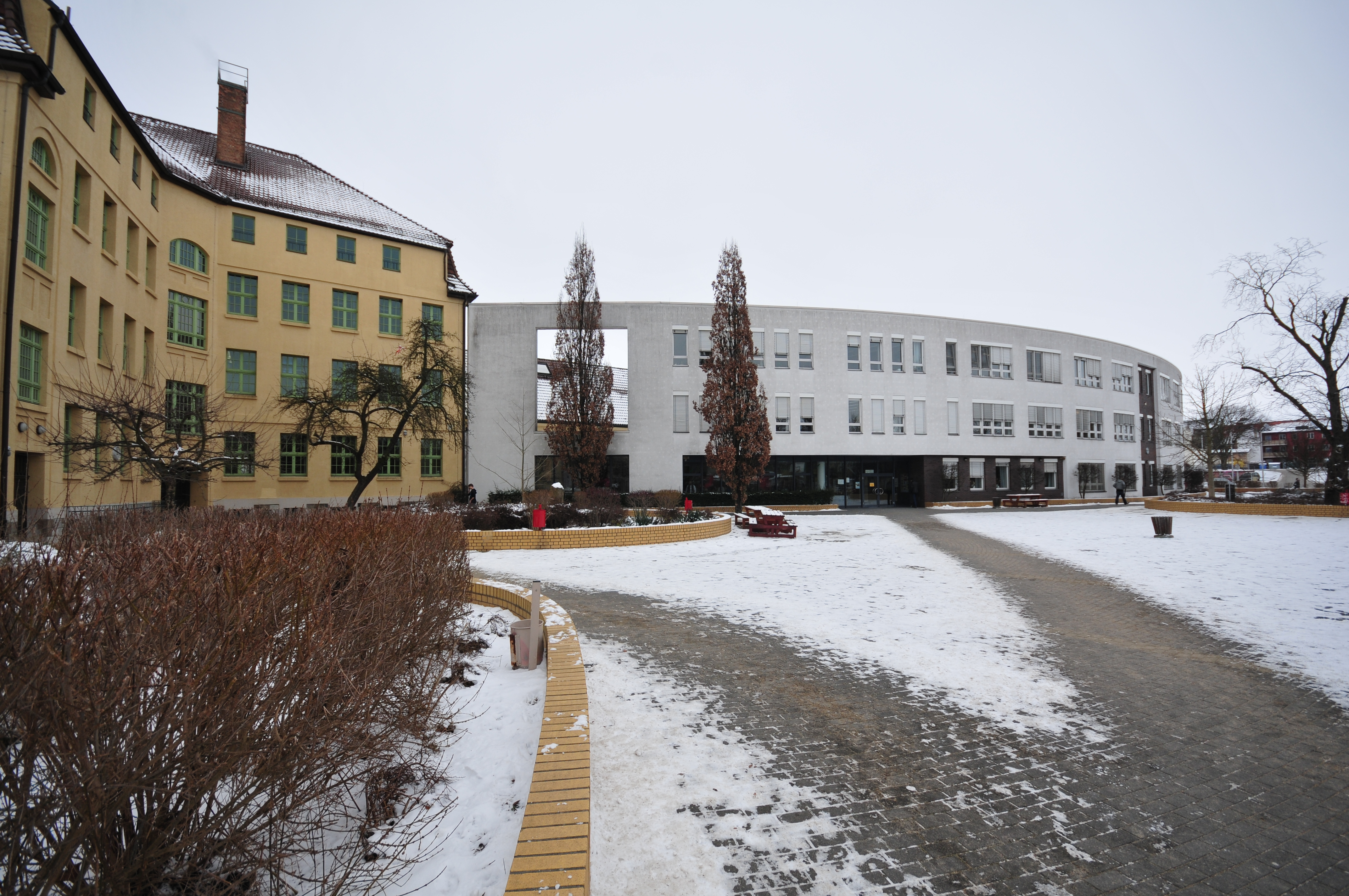 Einstein-Gymnasium Angermünde